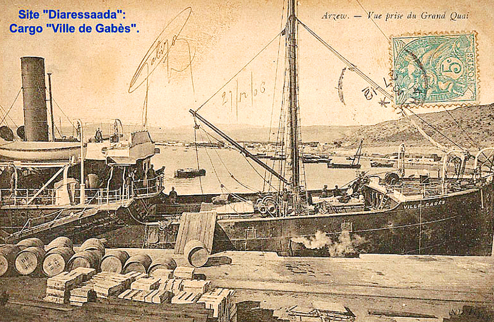 Chargement en 1906 des fûts de vins d'Algérie dans le port oranais d'Arzew